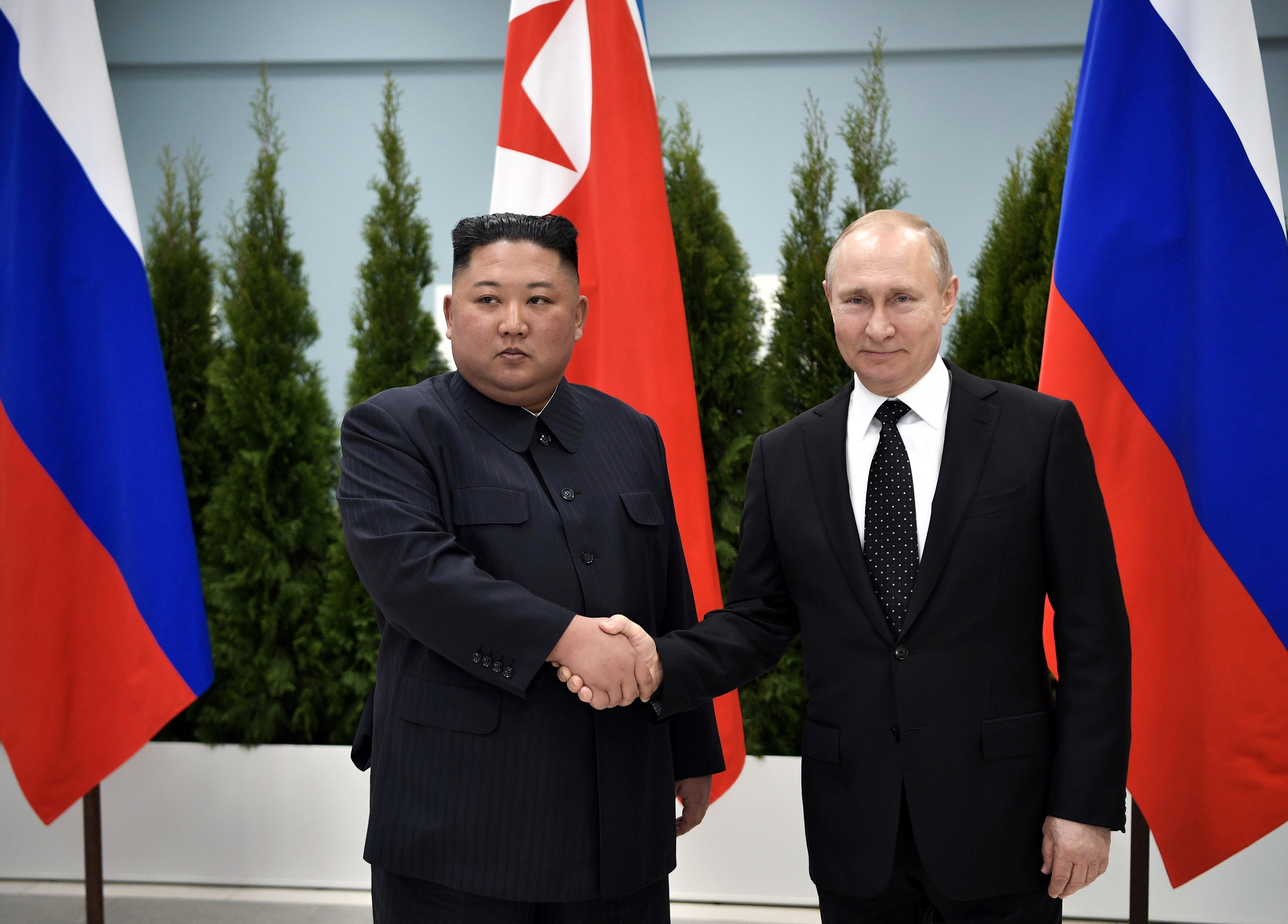 Переговоры Президента Российской Федерации Владимира Путина с Председателем Государственного совета Корейской Народно-Демократической Республики Ким Чен Ыном. Россия, Владивосток, остров Русский.